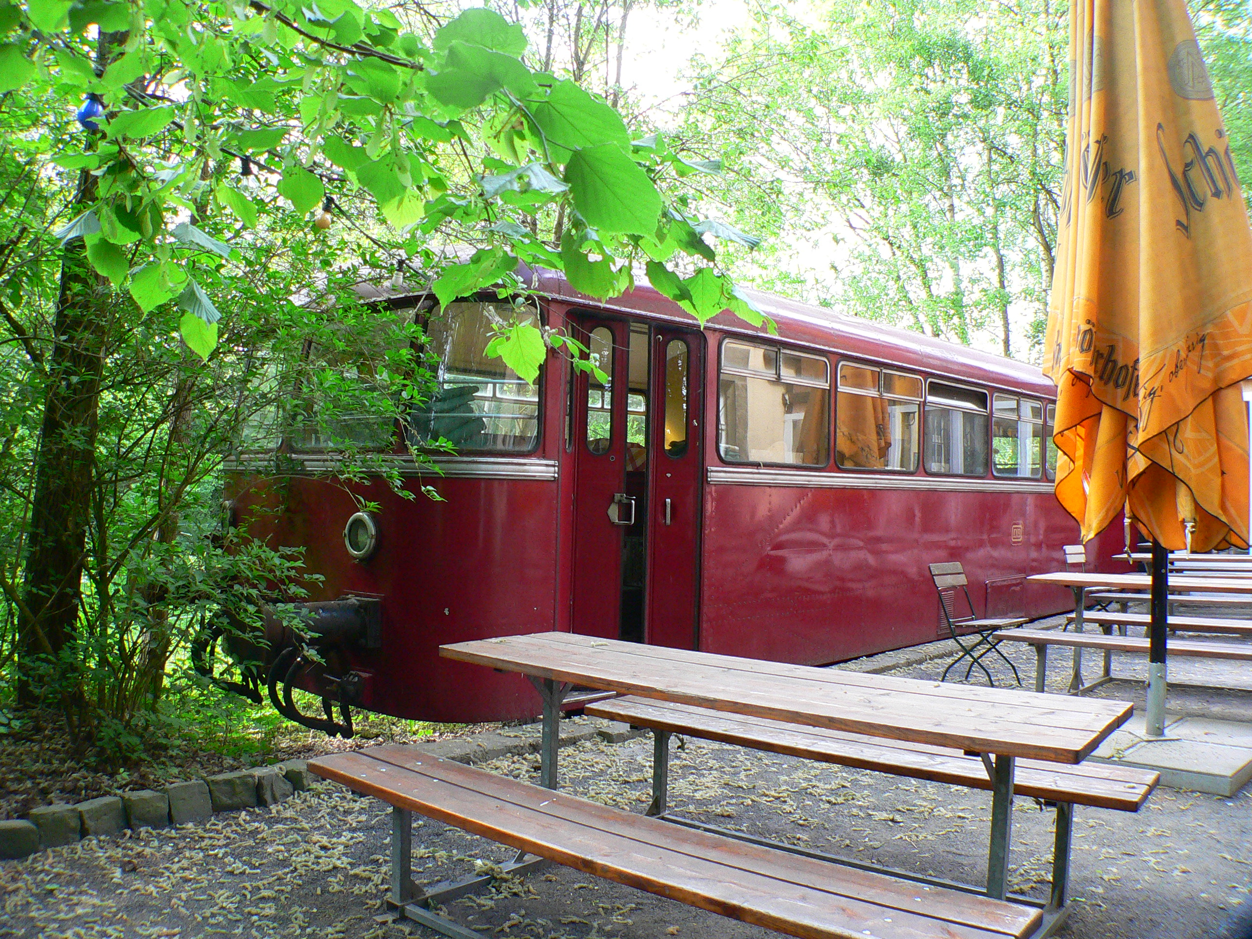 Wohratalbahn - Schienenbus-Beiwagen am ehem. Bahnhof Gemünden (Wohra).